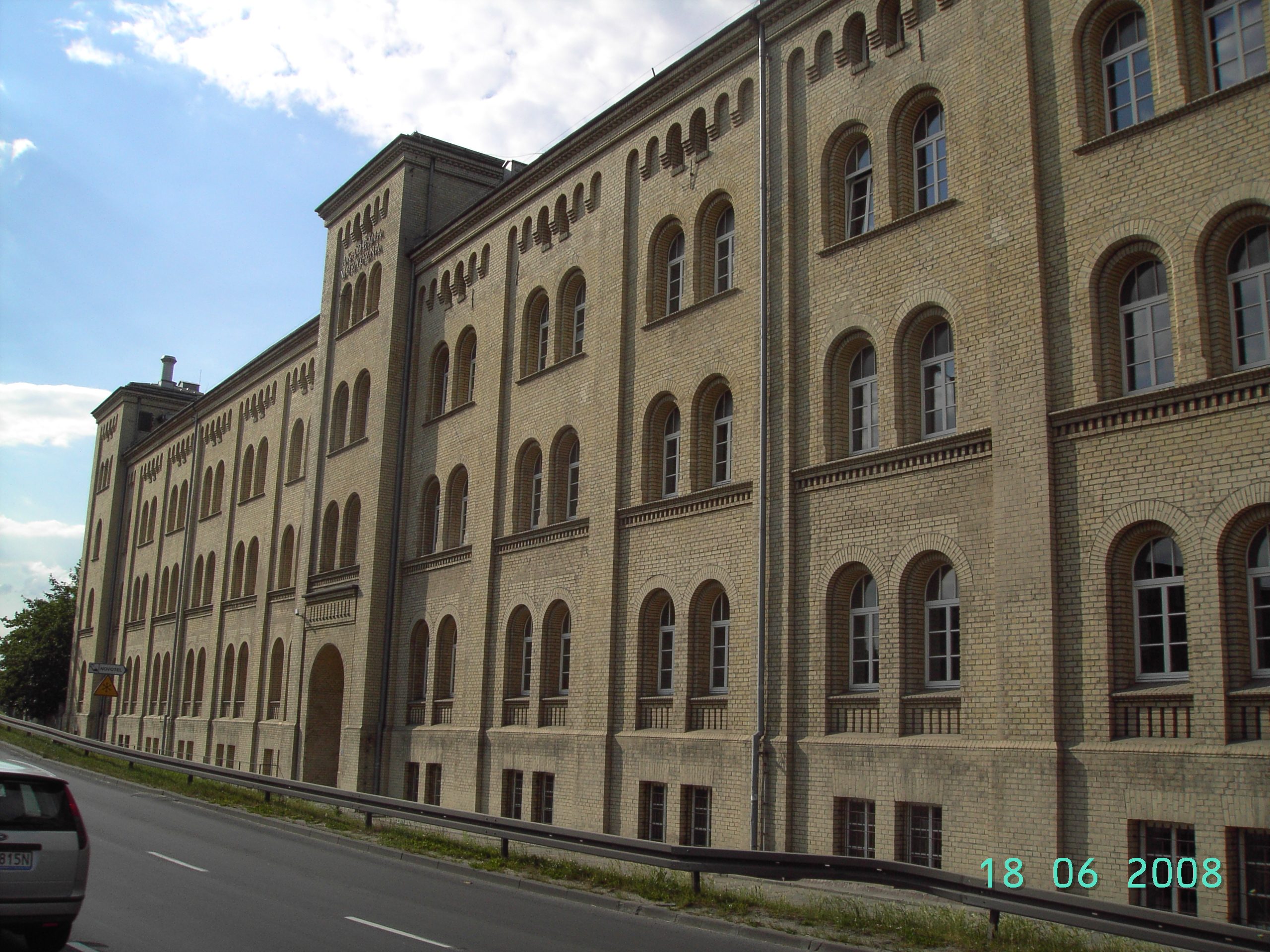 Akademia Muzyczna im. Stanisława Moniuszki w Gdańsku. / Dawne koszary.